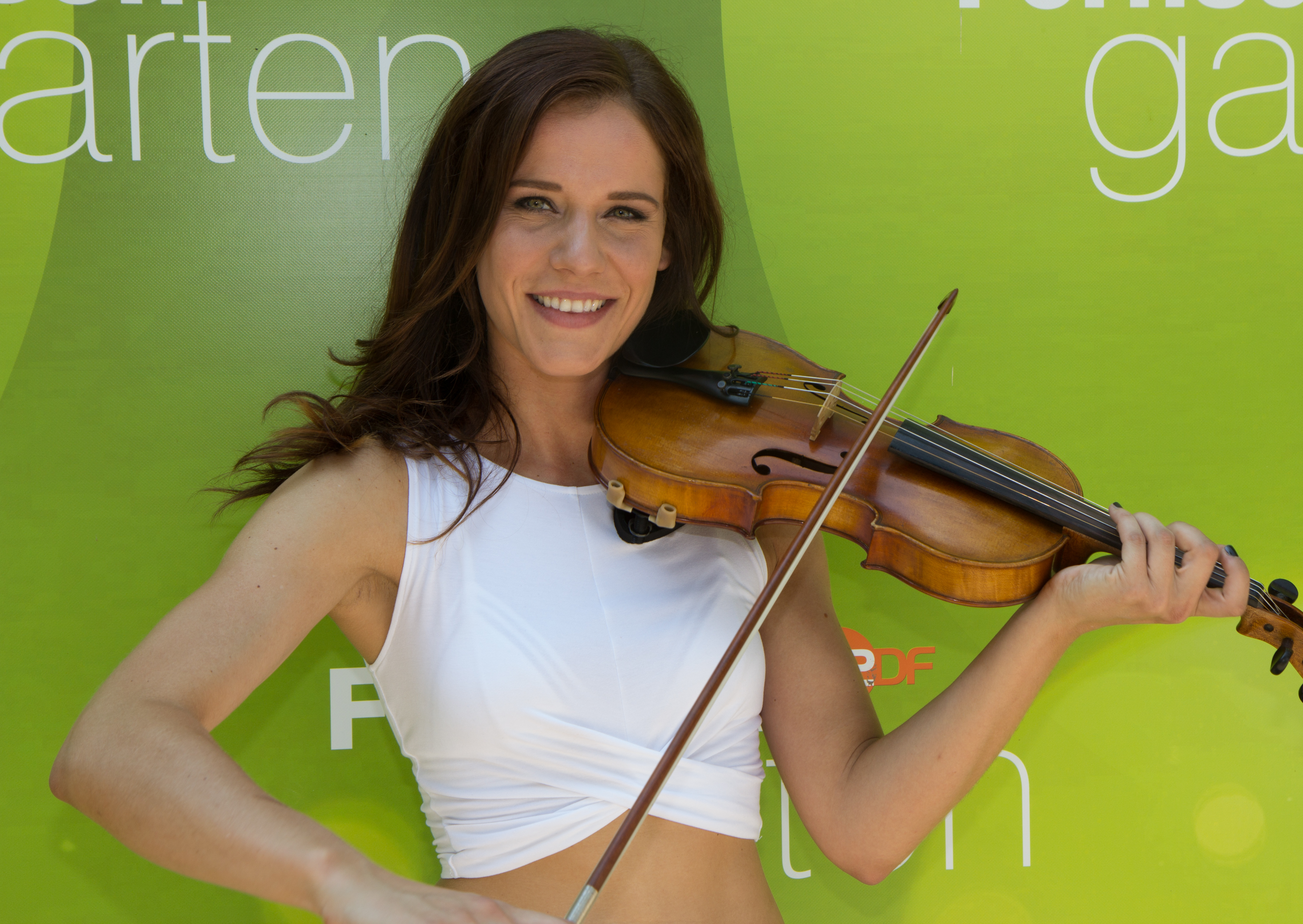 Franziska Wiese als Gast beim ZDF-Fernsehgarten am 15. Juli 2018 in Mainz.